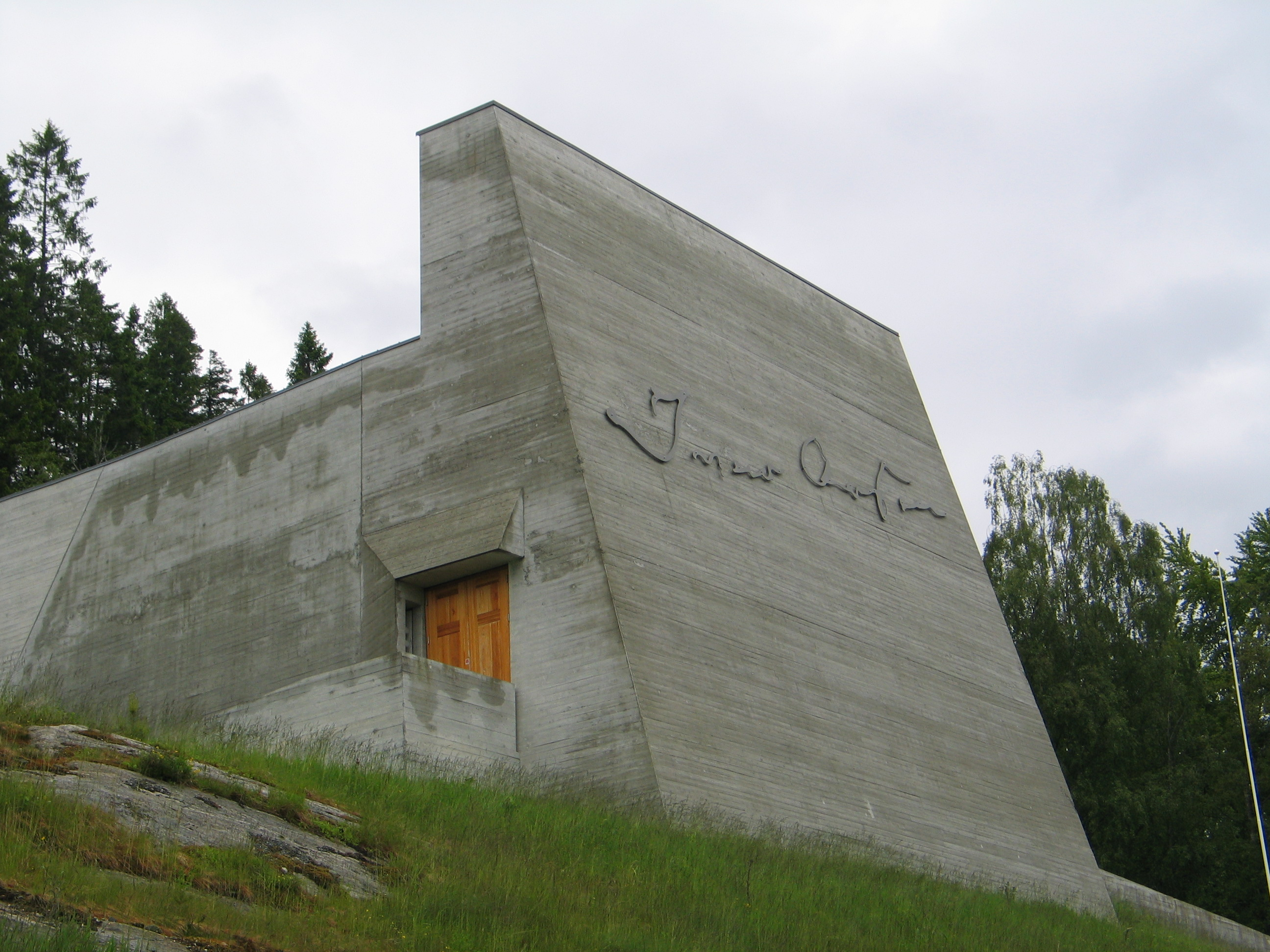 Ivar Aasen-tunet